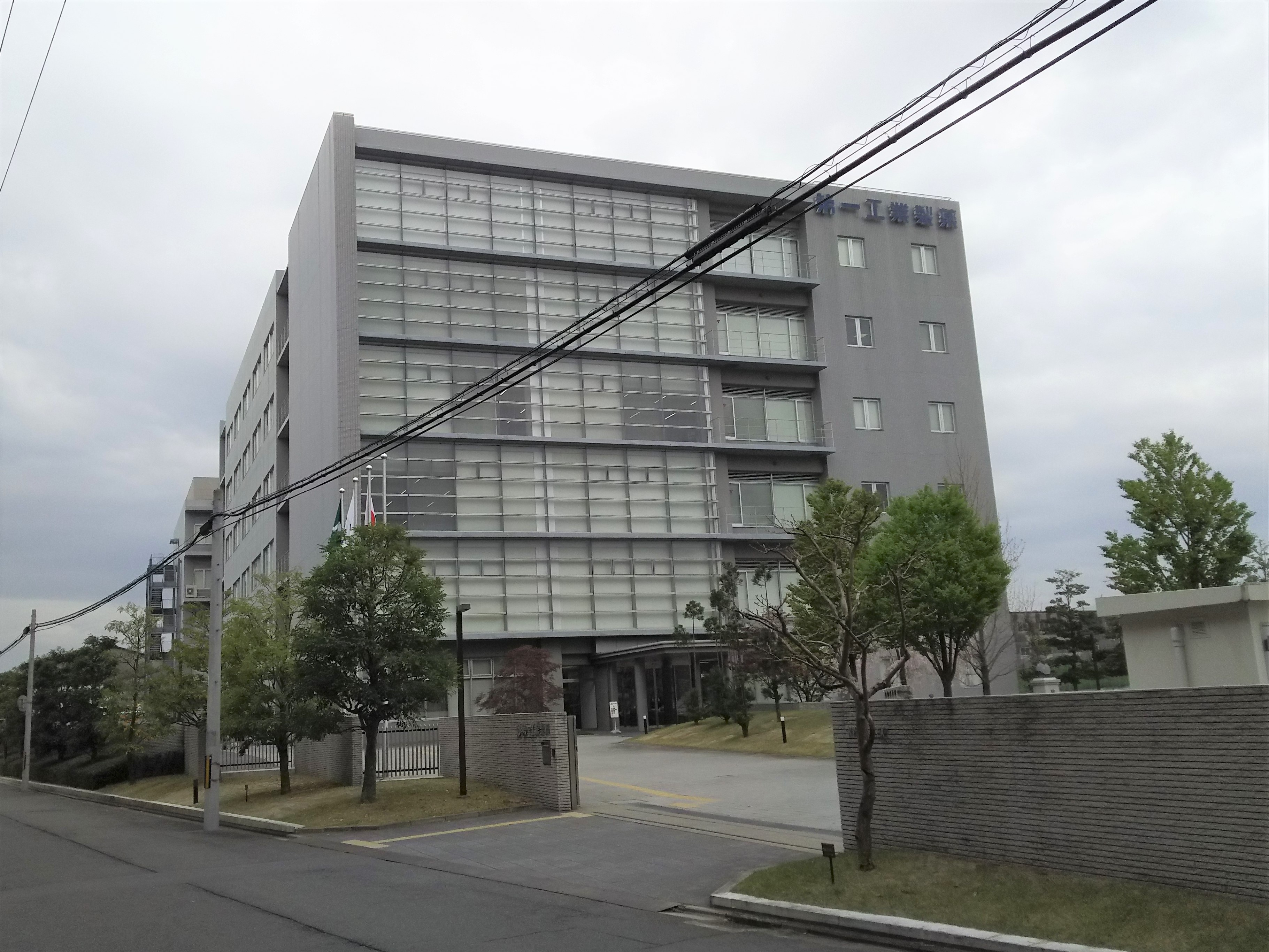 第一工業製薬本社（京都市南区）